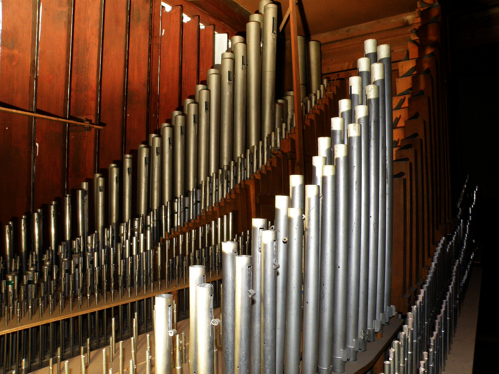 Varhany ve sboru ČCE Praha-10 Strašnice